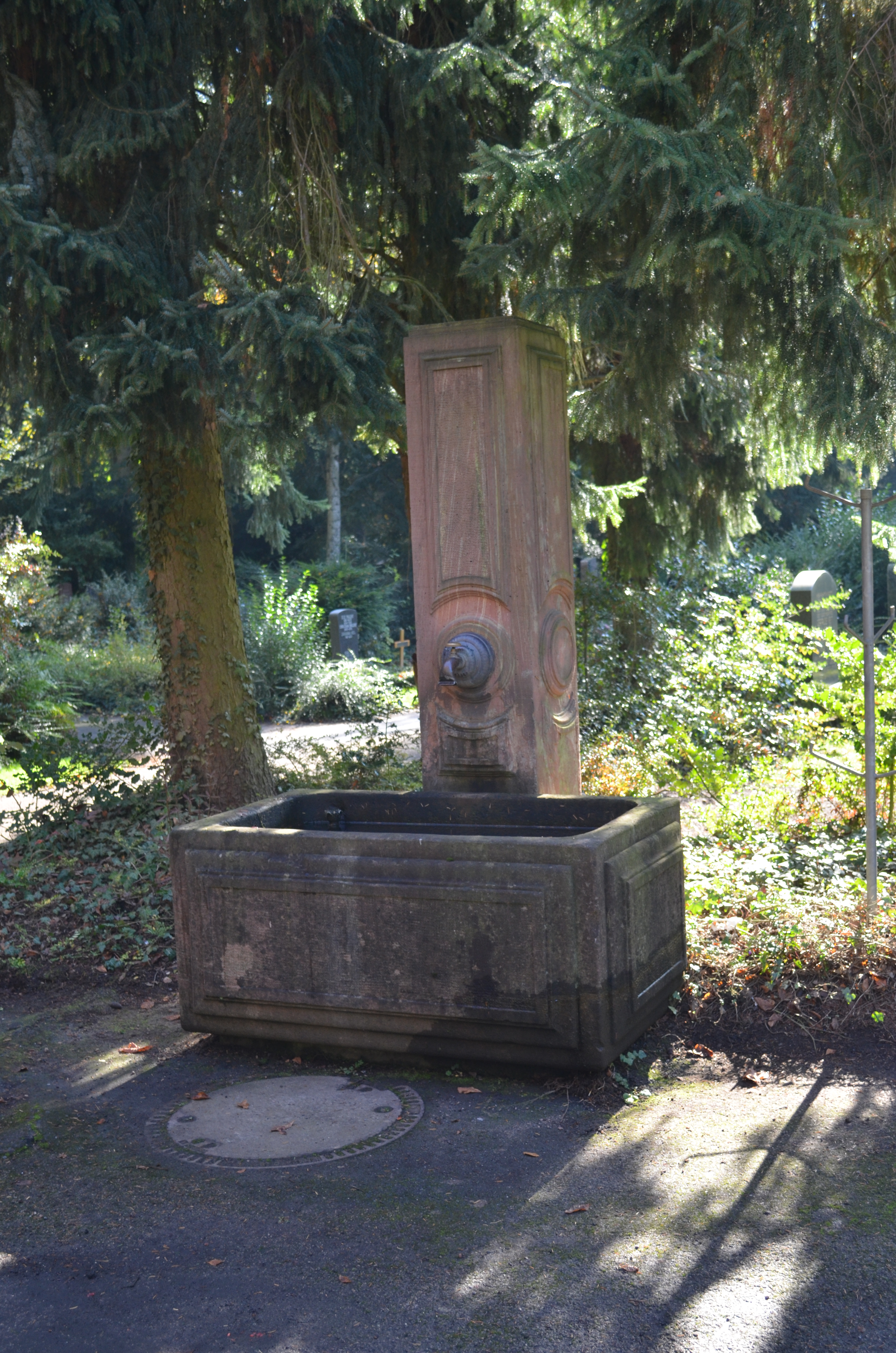 Frankfurt, Hauptfriedhof, Brunnen bei J 1940